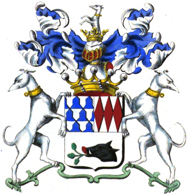 Armoiries de la famille de Geradon